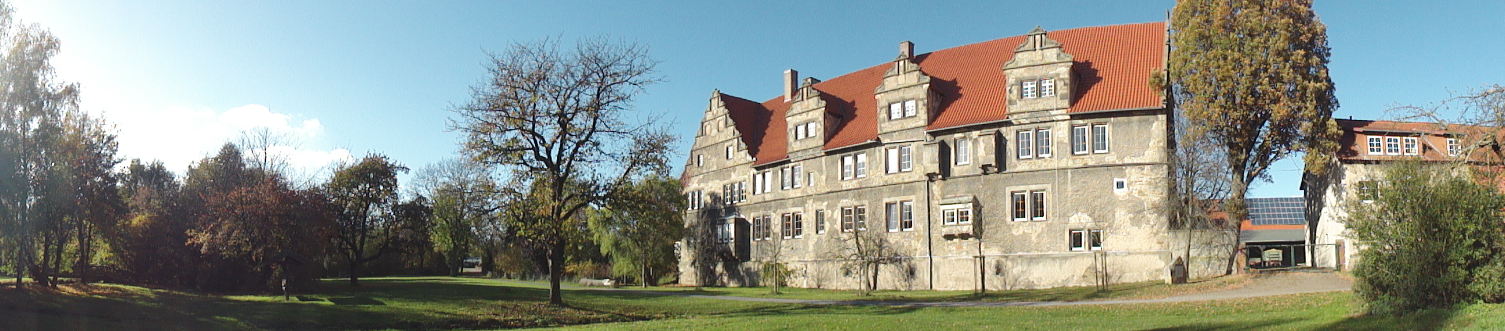 Panoramaaufnahme aus dem Münchhausenpark